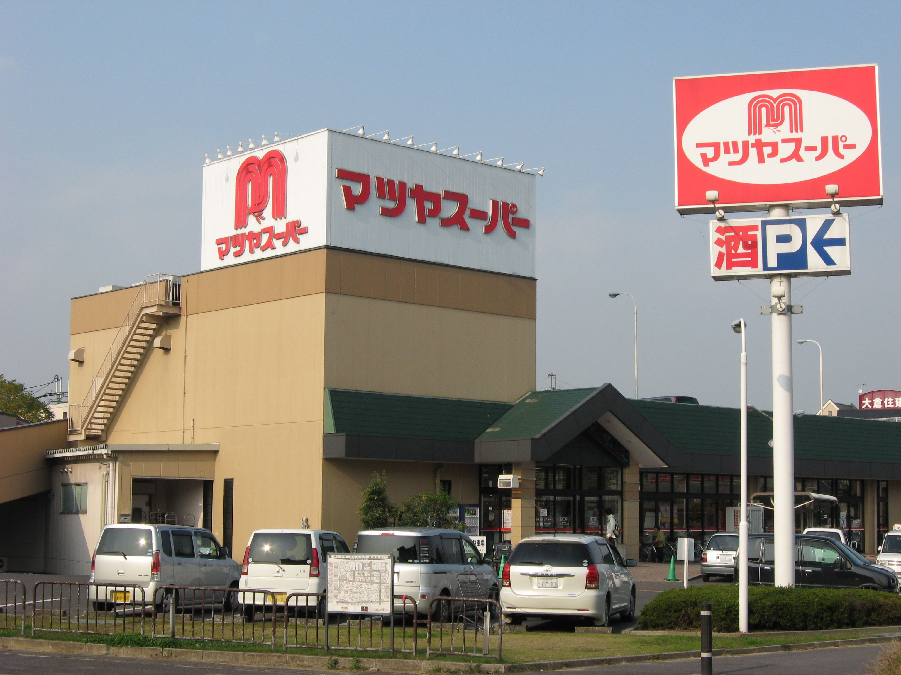 Matsuya Supermarket（マツヤスーパー）